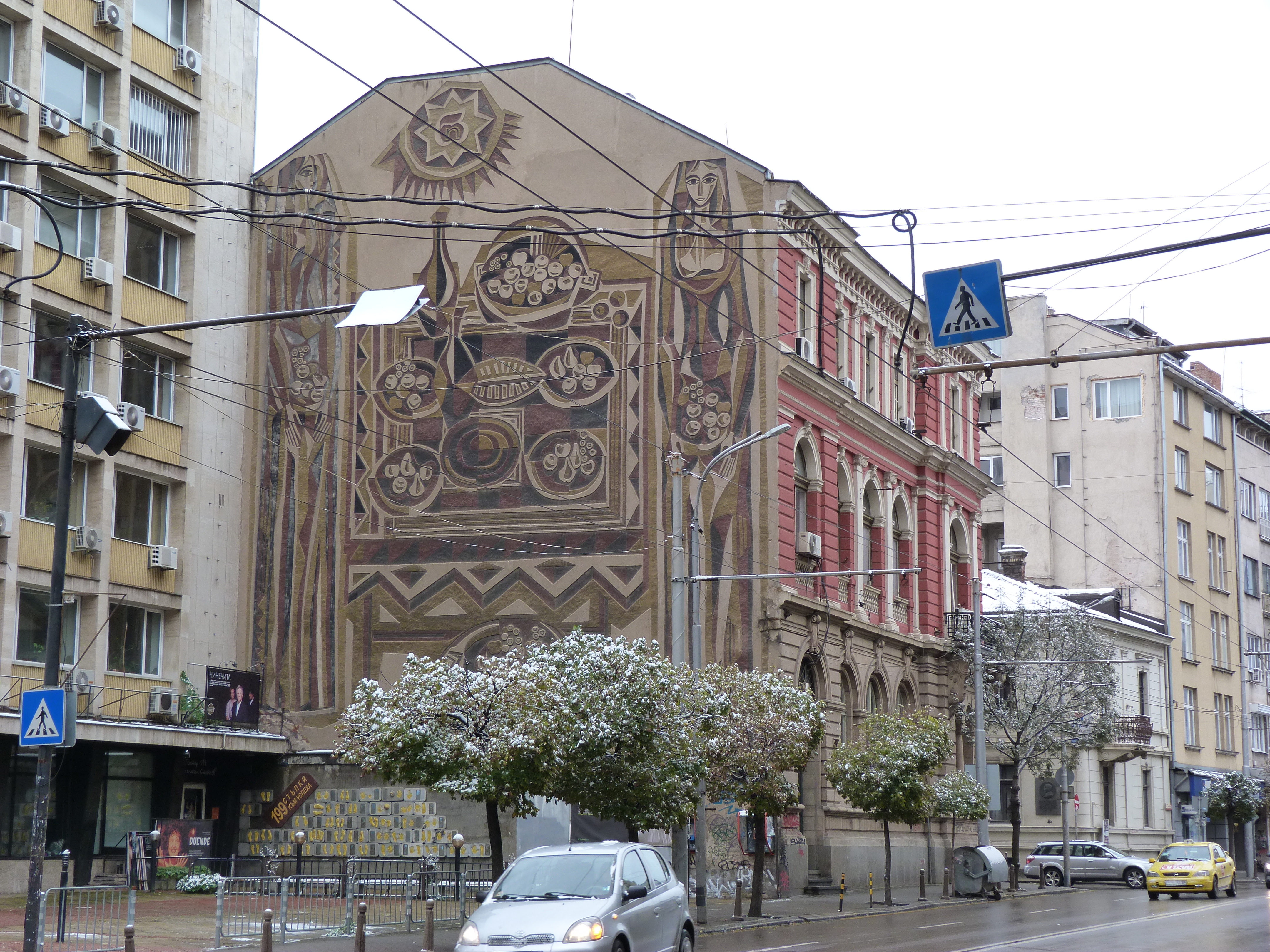 A felvétel 2014. október 26-án készült Szófiában. ©© Derzsi Elekes Andor, Budapest, 2014, A kép egészben, vagy részletekben másolását, bármilyen úton történő sokszorosítását és felhasználását a szerző ellenérték nélkül, jogutódjaira is kihatóan megengedi. Az engedély kiterjed a kereskedelmi célú hasznosításra is. Kéri azonban nevének feltüntetését a felhasználás során. A Metapolisz sorozat valamennyi képe és filmje Creative Commons alatti valamint kereskedelmi - for profit - célra is felhasználható. Ajánlott hivatkozás: Derzsi Elekes Andor: Metapolisz DVD line